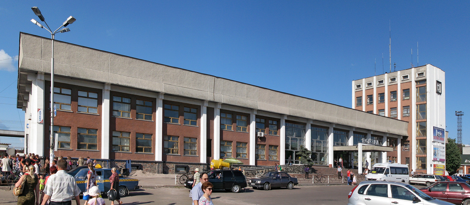 Вокзал станції Коростень